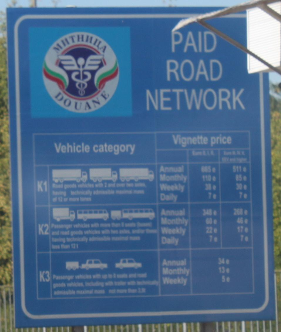 Vignettenpreise für Bulgarien anno 2011. Verkehrsschild im Hafen von Vidin.